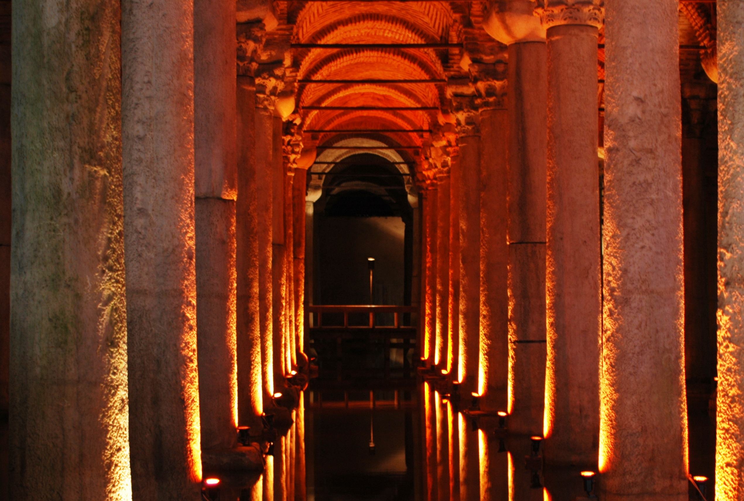 Cisterna de Yerebatan